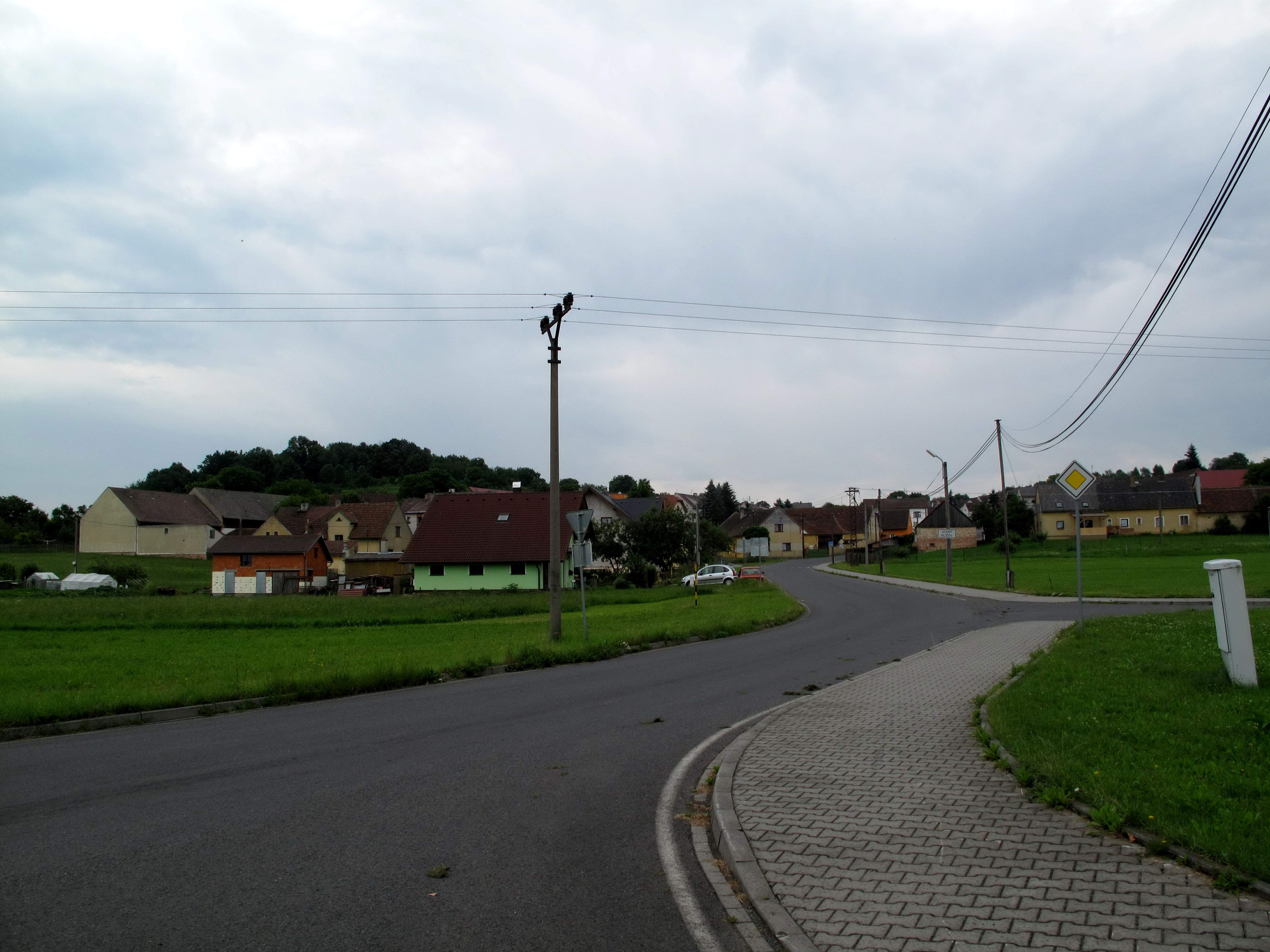 Starý Klíčov